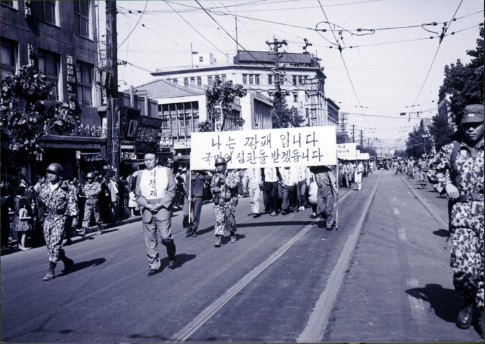 1961년 조리돌림을 당하는 이정재.